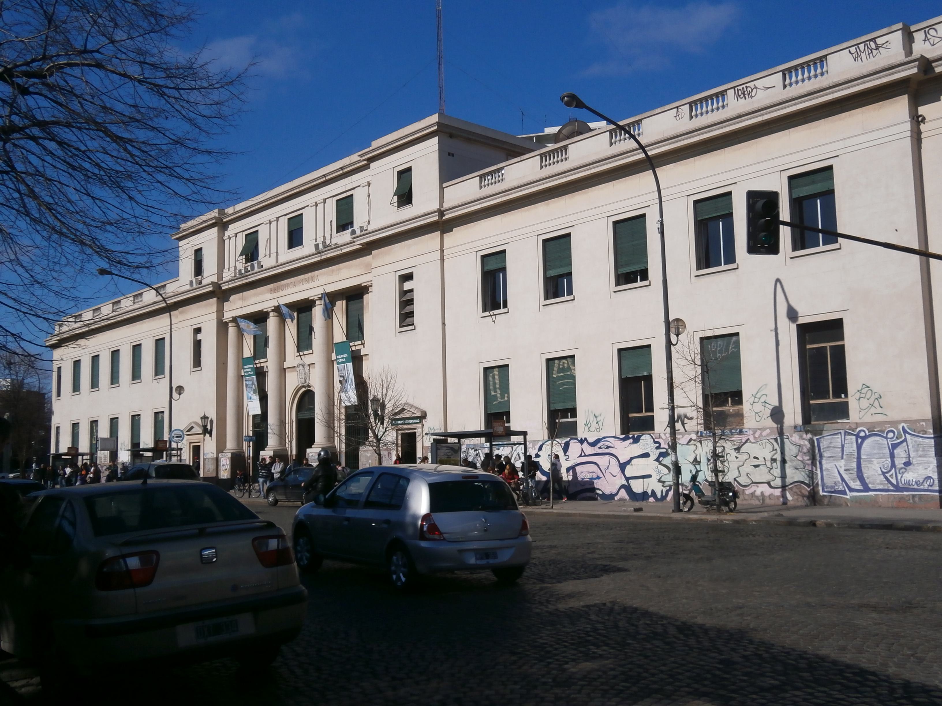 Biblioteca Publica de la Universidad Nacional de La Plata, Argentina. Frente a la Plaza Rocha.